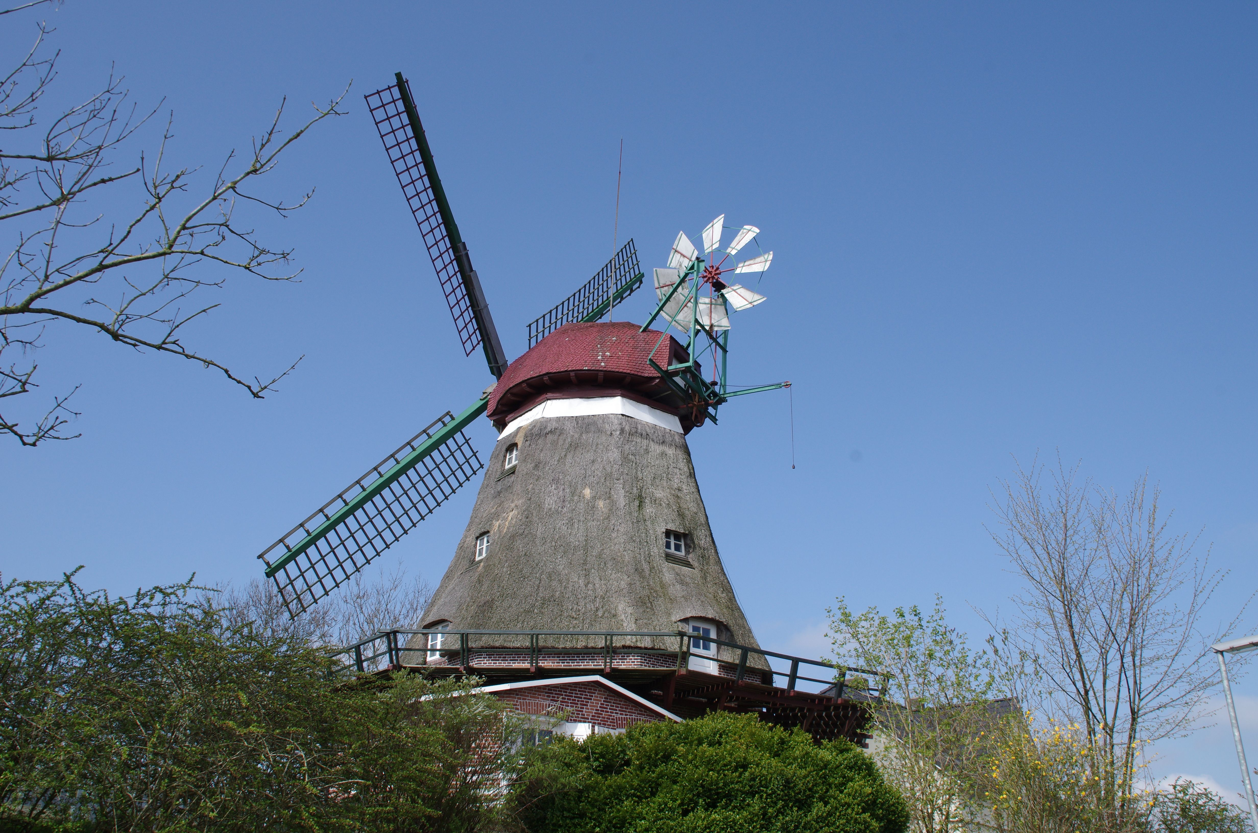 Boren in Schleswig-Holstein. Die Mühle steht unter Denkmalschutz.